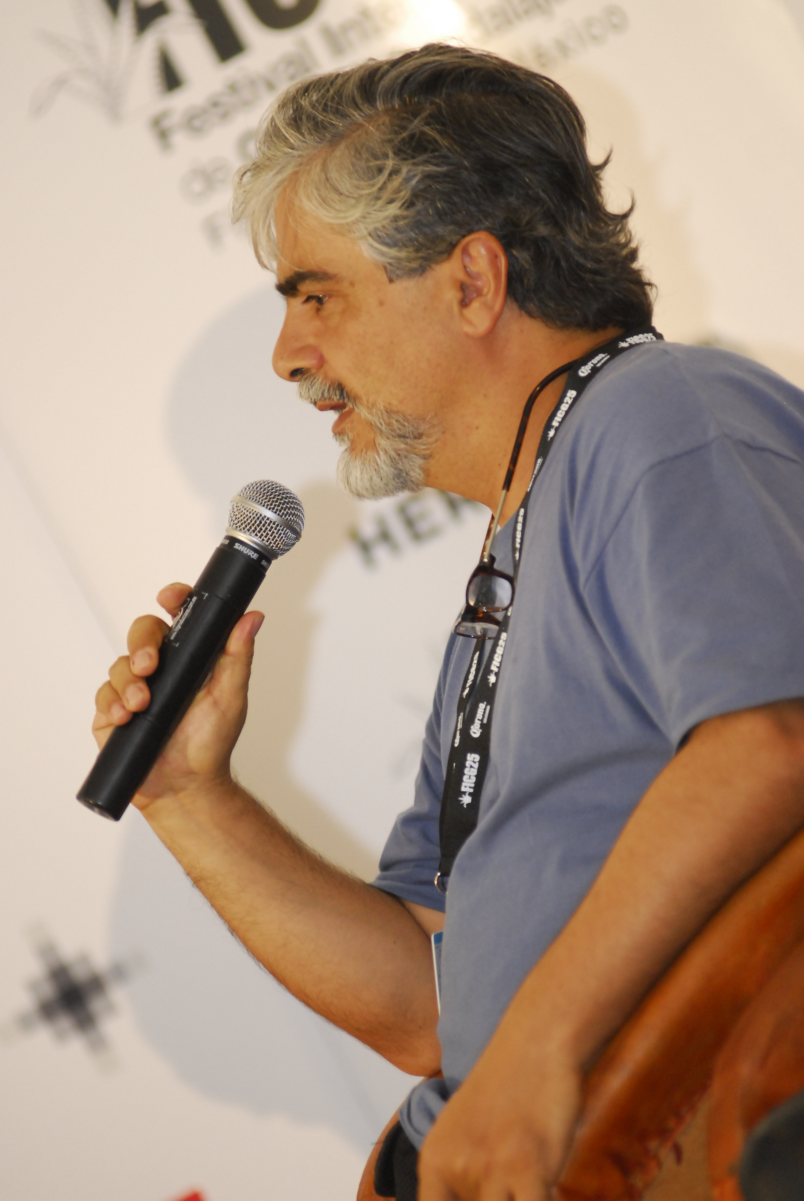 El director de la película Retratos en un mar de mentiras, Carlos Gaviria; en un encuentro con los medios en el Festival Internacional de Cine en Guadalajara